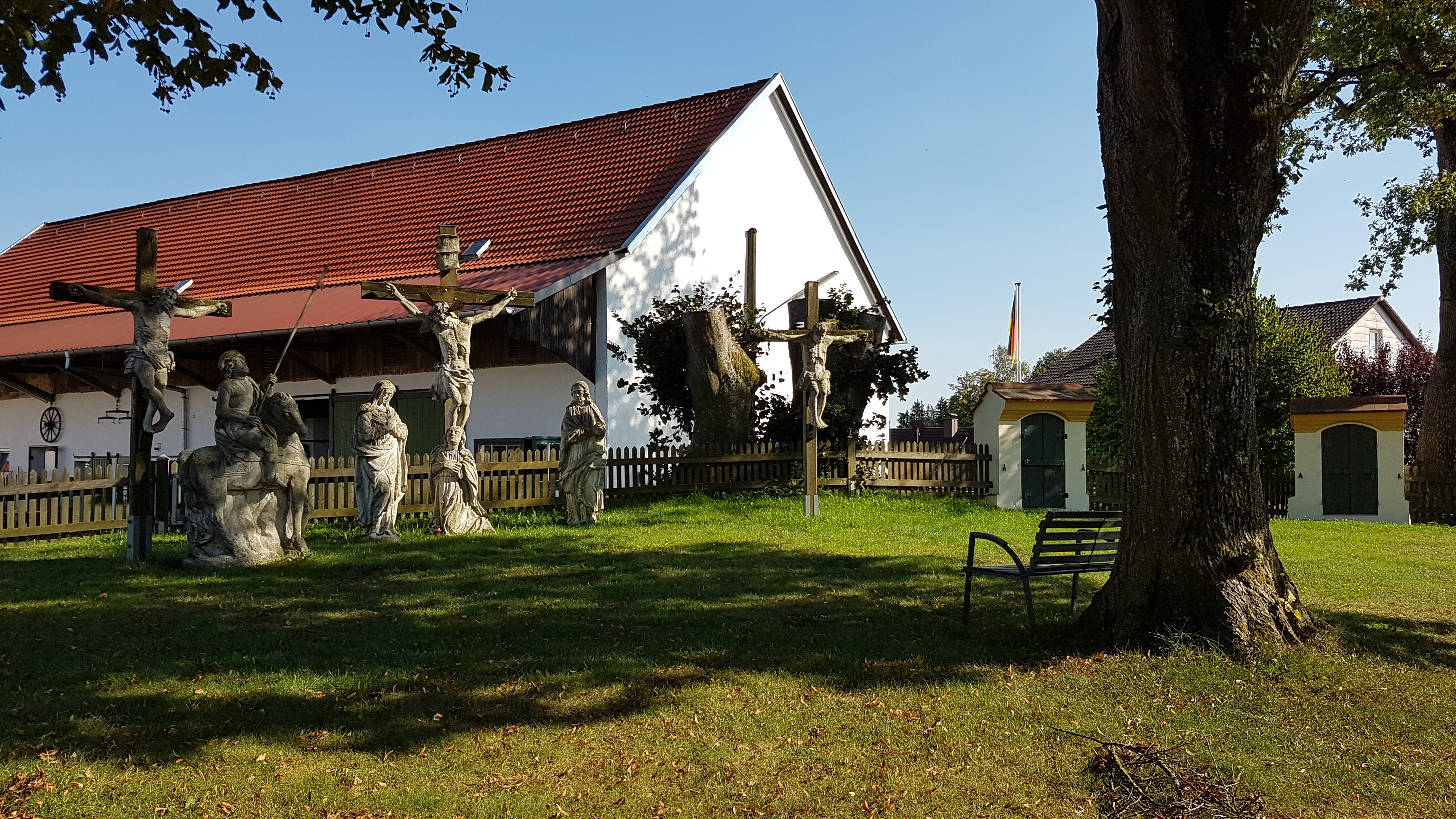 Kalvarienberg (Wenigmünchen)